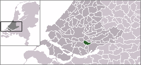 Location of Zwijndrecht, Netherlands